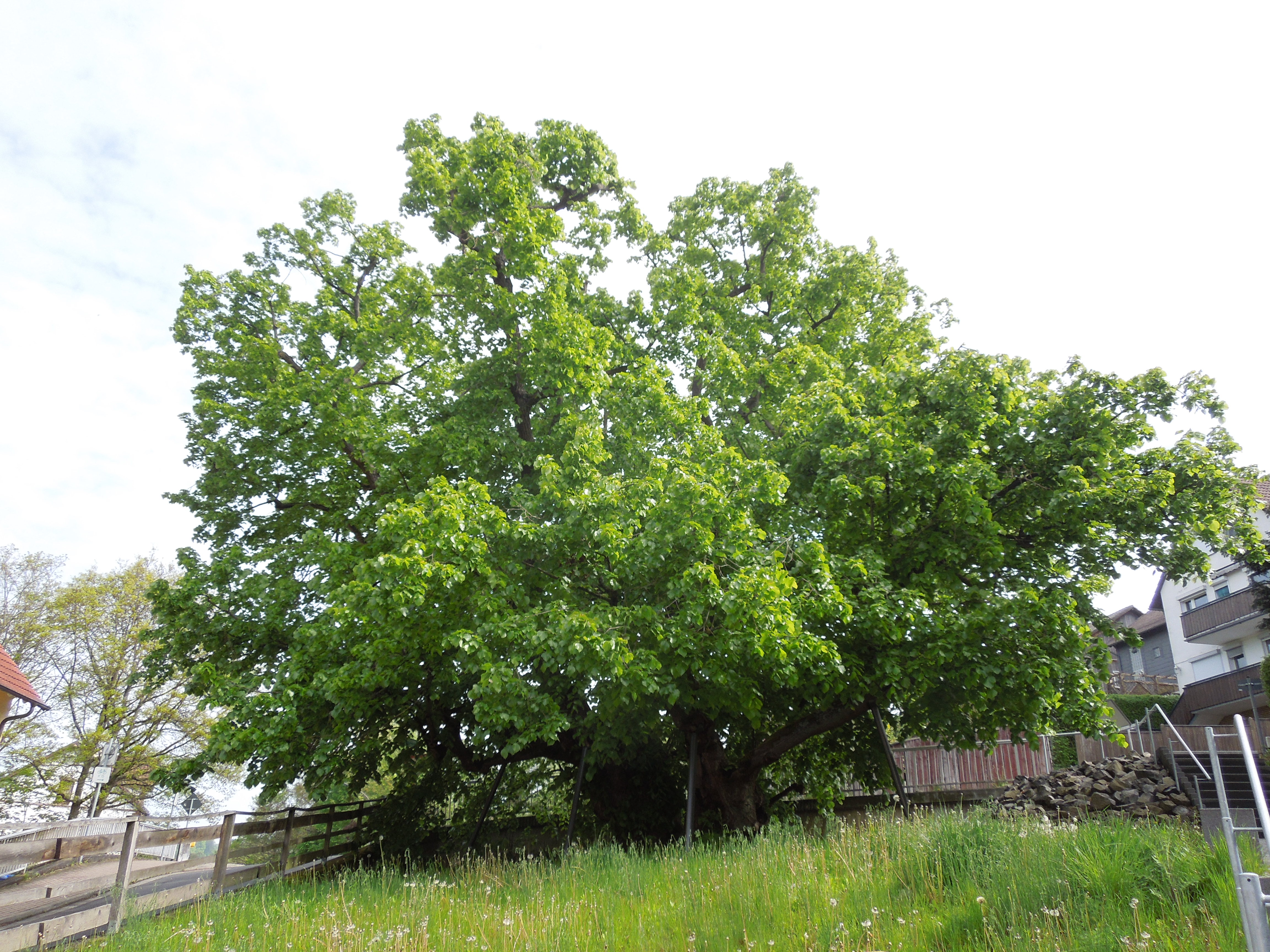 Niedensteiner Tanzlinde, 2017